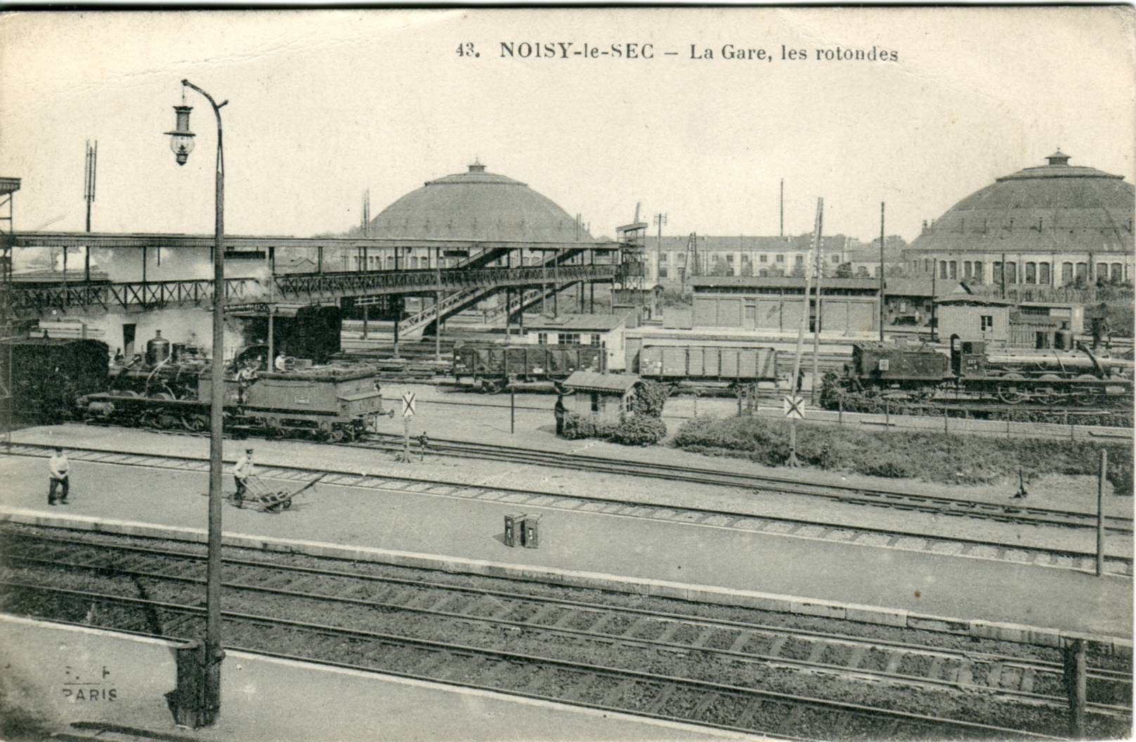 Carte postale ancienne NOISY-LE-SEC : La Gare, les rotondes